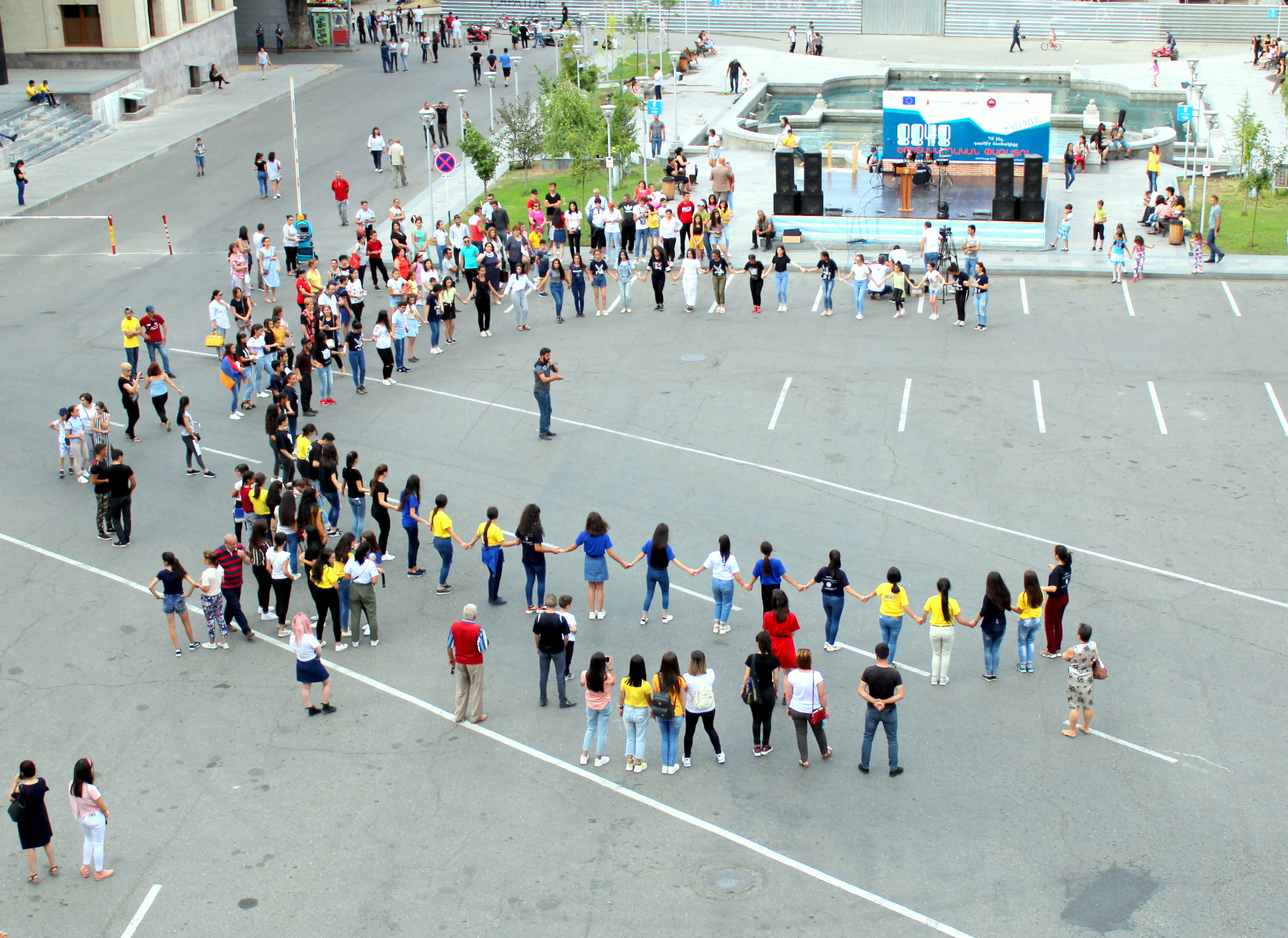 Ազգային պարերի ուսուցում Կապանի Գարեգին Նժդեհի անվան հրապարակում Սիսիանի «Որոտնա» համույթի մասնակցությամբ